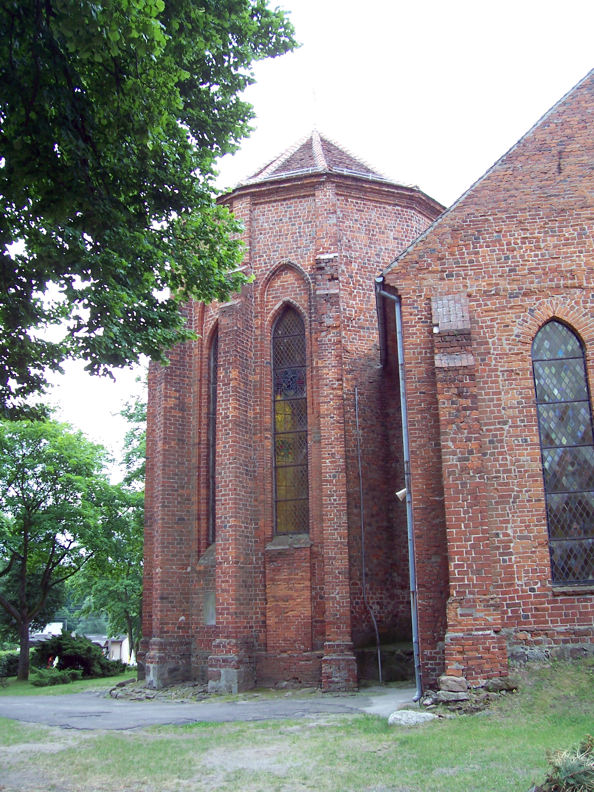 Bierzwnik - kościół pw. Matki Boskiej Szkaplerznej (zabytek nr rejestr. 412/92 z 9.09.1992)